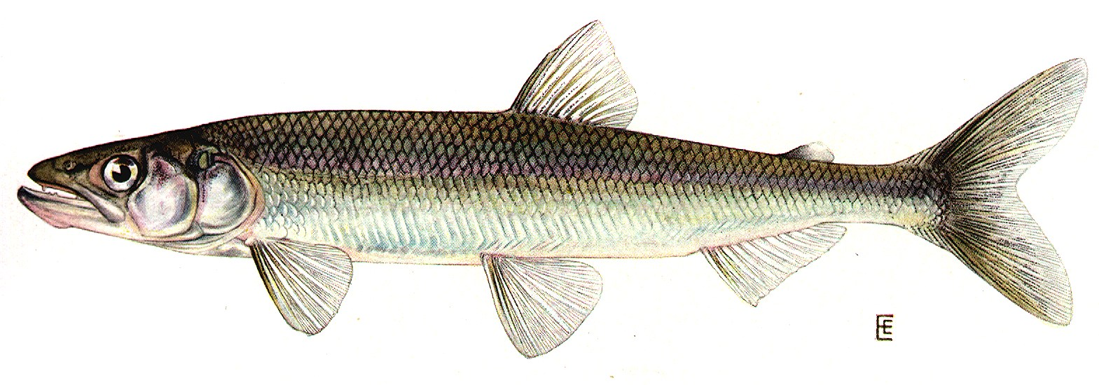 Rainbow Smelt (Osmerus mordax)